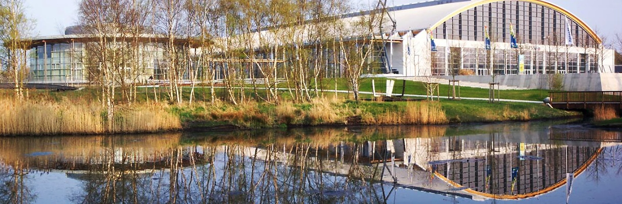 Messehalle und Rotunde der Hansemesse in Rostock